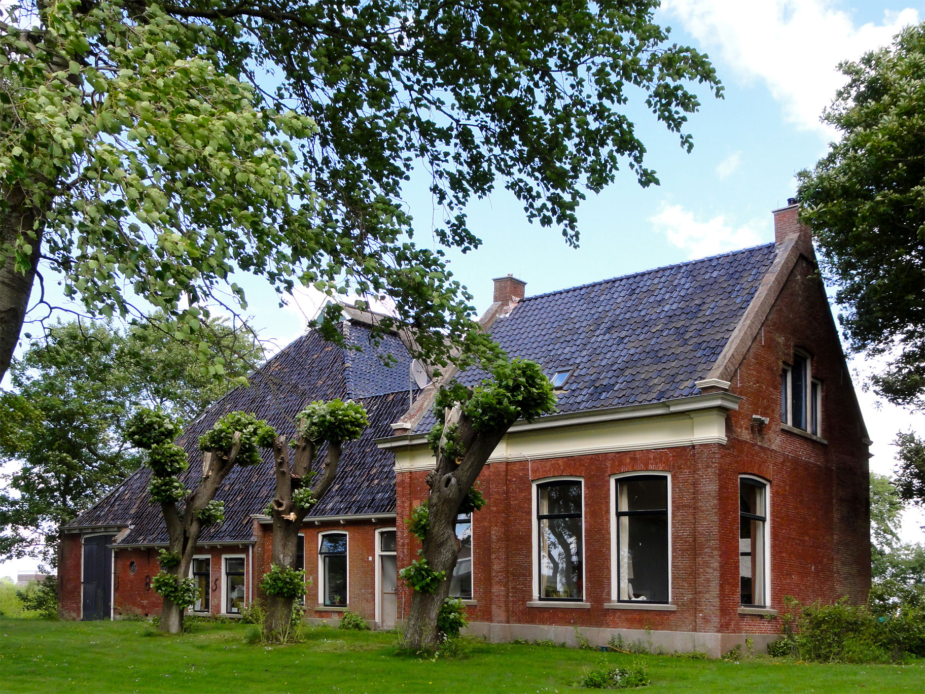 Koudeweg 40 in Sint-Jacobiparochie